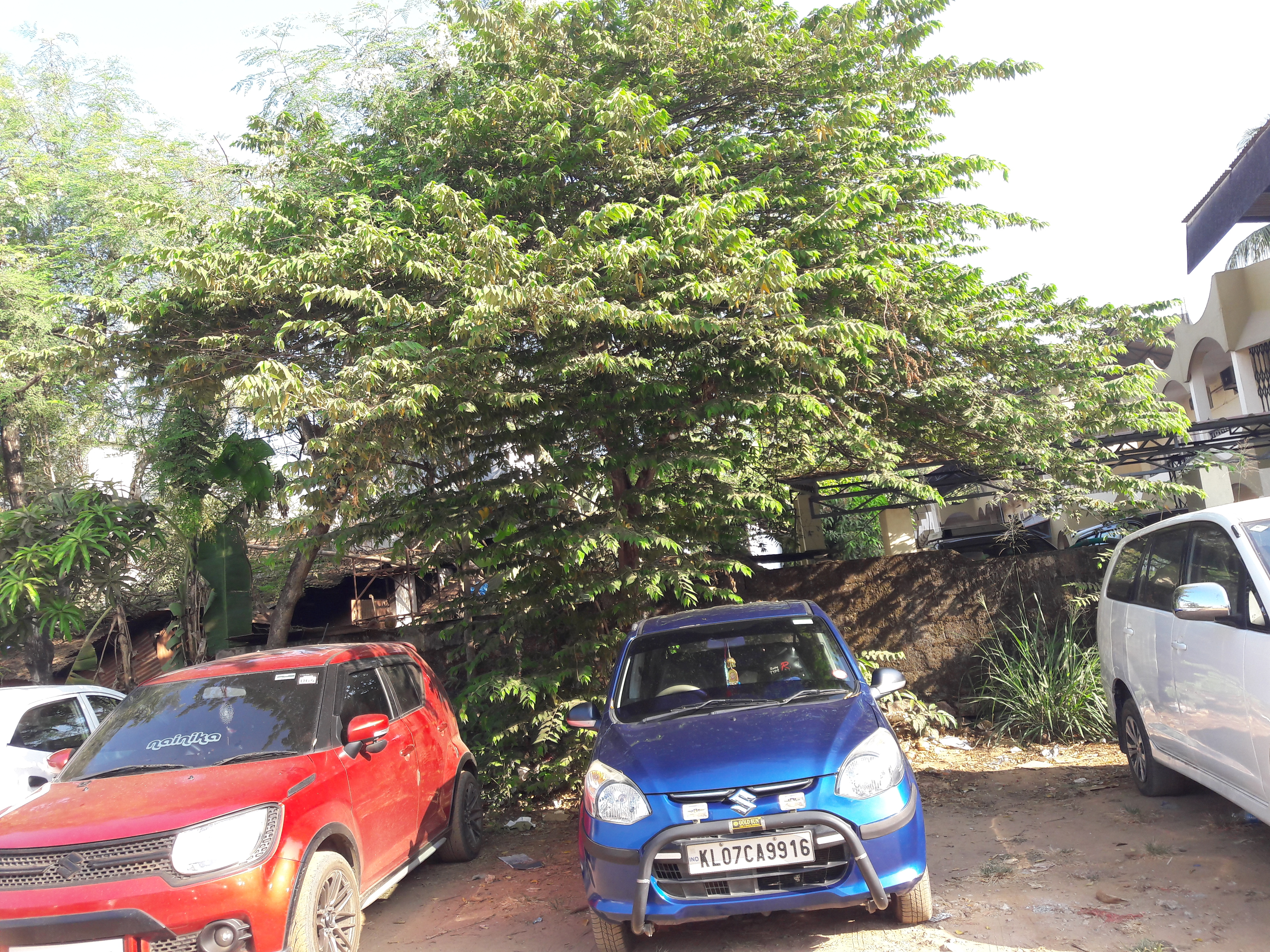 ഗുരുവായൂര്‍ അമ്പലത്തിലെ കാര്‍ പാര്‍ക്കിനടുത്ത് തണല്‍ വിരിച്ച് നില്‍ക്കുന്ന ജമൈക്കൻ ചെറി മരം. ശാസ്ത്രീയ നാമം Muntingia calabura. കുടുംബം Muntingiaceae.